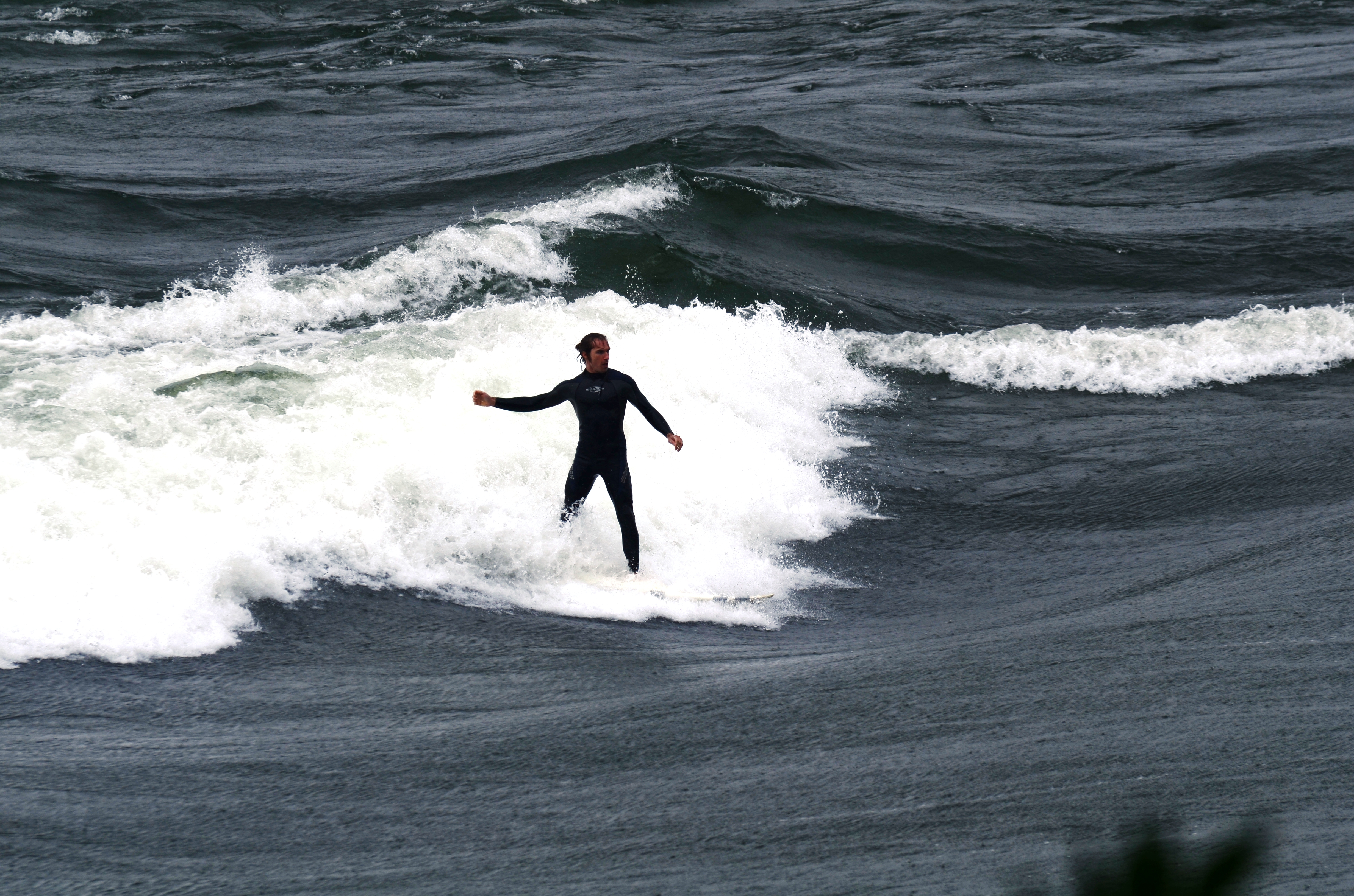 Vague Habitat 67 (surfeurs) in Montréal